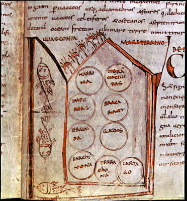 Manuscrito del monasterio de Ripoll, Mapa de la Península Ibérica. Archivo de la Corona de Aragón